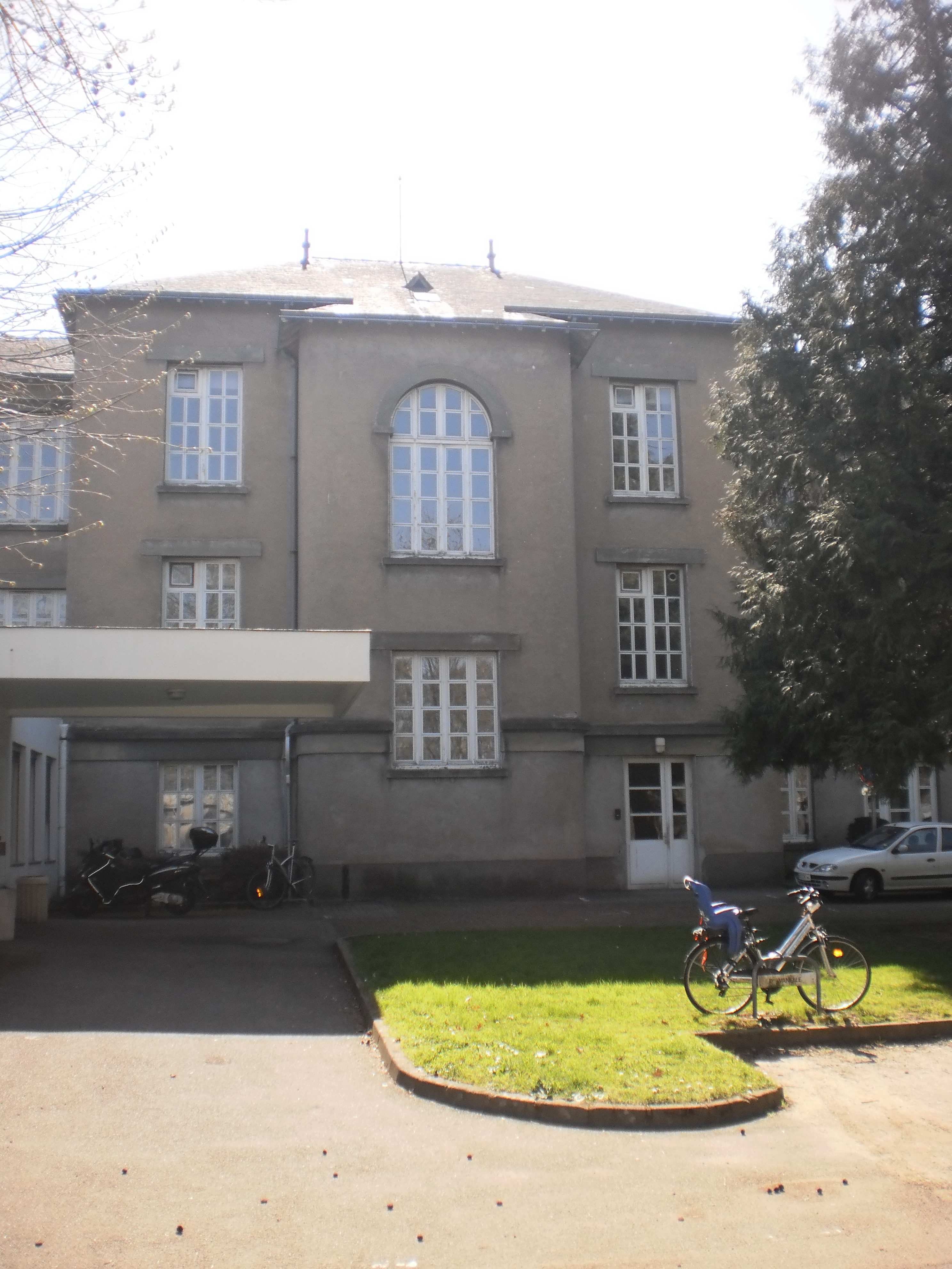 Hôpital Saint-Jacques de Nantes (France) - Bâtiment sud This edifice is inscrit Monument Historique. Object location 47° 11′ 49.79″ N, 1° 32′ 13.56″ W This and other images at their locations on: Google Maps - Google Earth - OpenStreetMap - Proximityrama(Info)